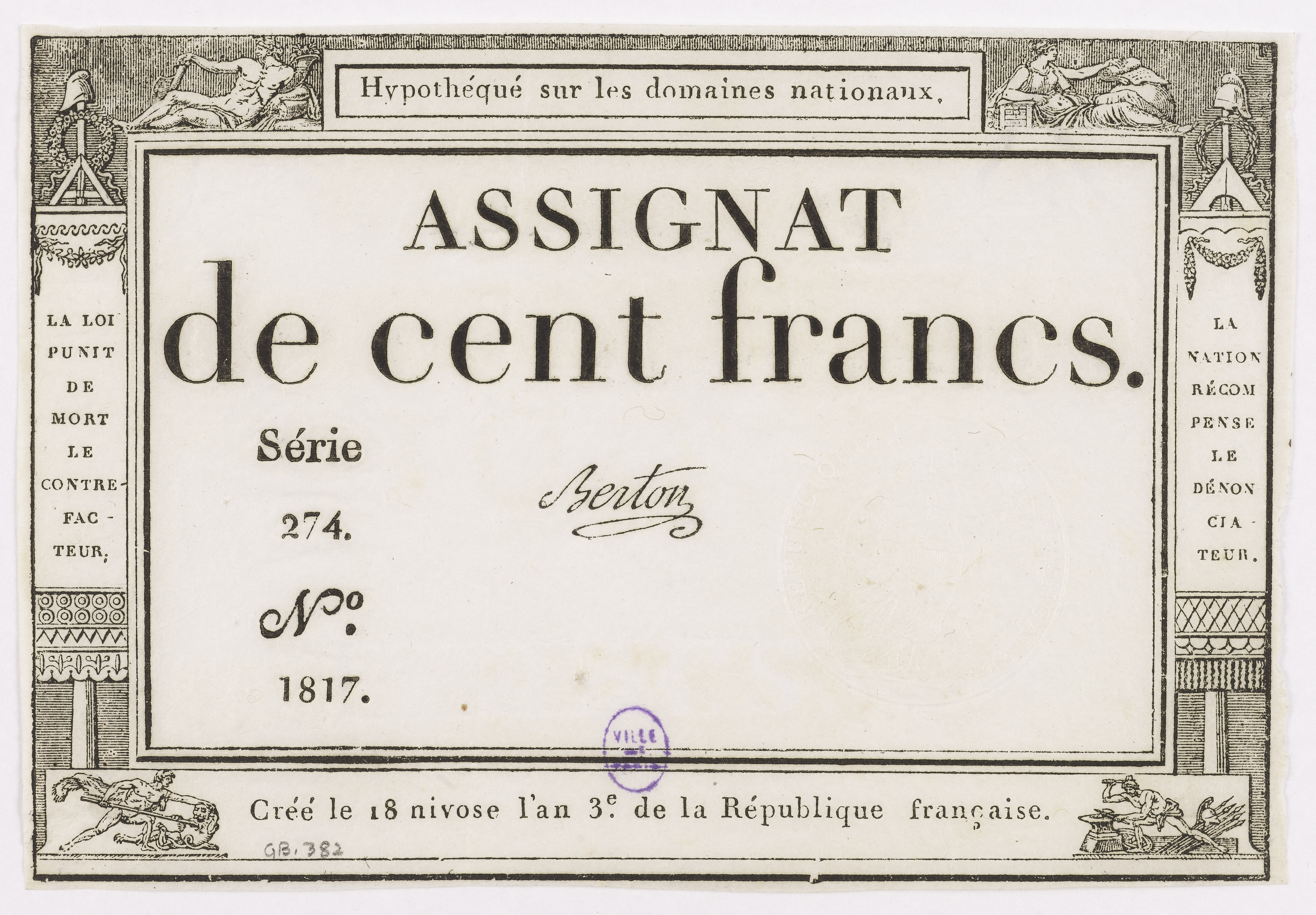 Assignat de 100 francs, série 274 - n° 1817, 18 Nivôse an 3